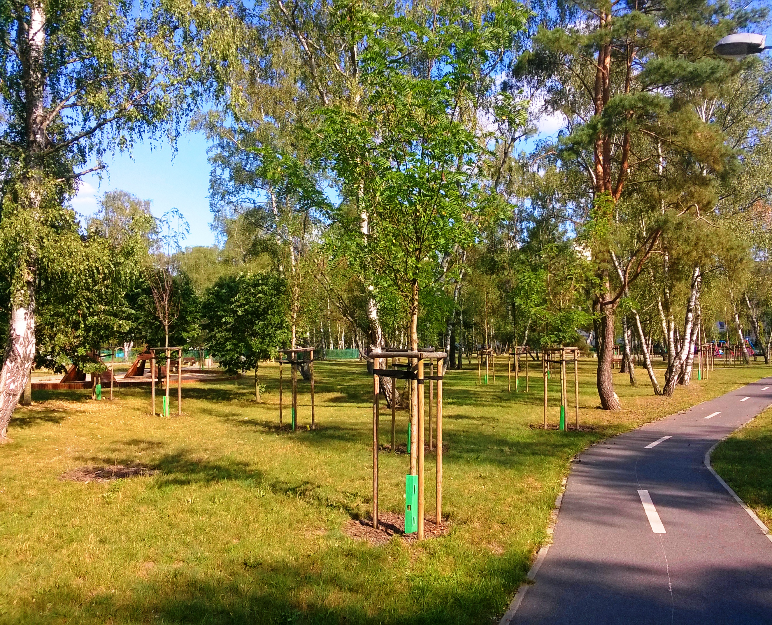 Park Na Skarpie w Toruniu2